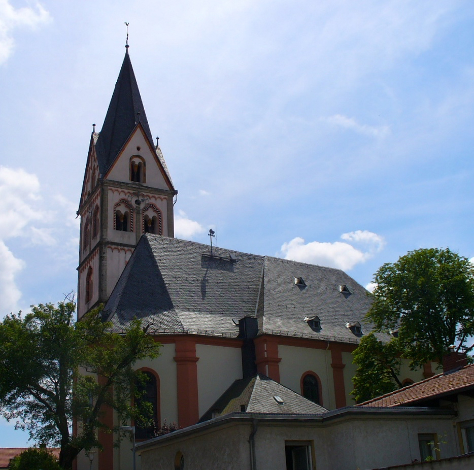 St. Remiguis in Nieder-Ingelheim